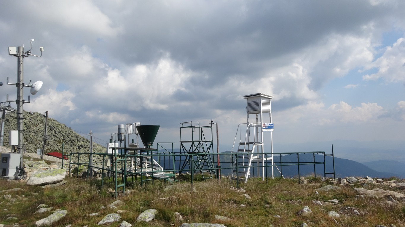 Meteorologická stanica